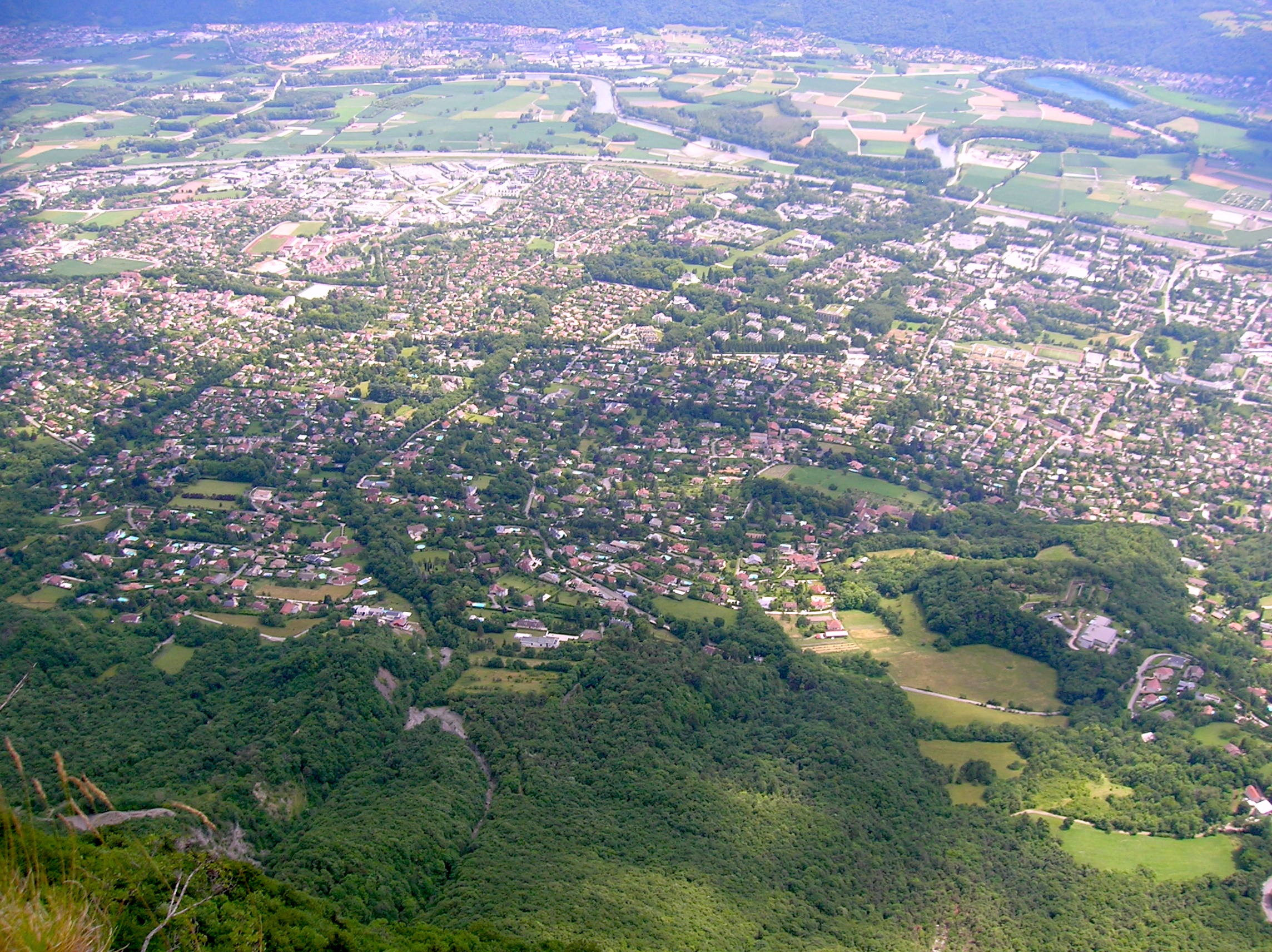 Vue générale de l'agglomeration grenoblois depuis le Fort St Eynard, Le Sappey-en-Chartreuse, Isère, France. Meylan, Montbonnot-Saint-Martin, Biviers, Domène, Murianette, Lac de la Taillat, etc.